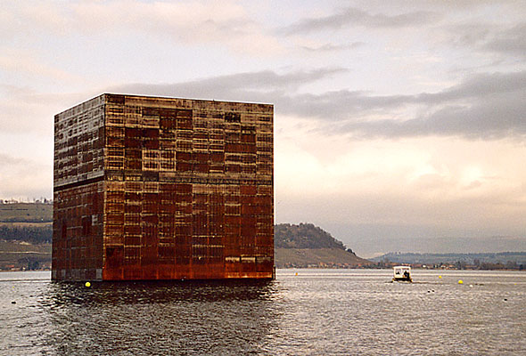 Murten: Der Monolith, das Wahrzeichen der Expo 02 von Murten (mittlerweile wieder abgebrochen)